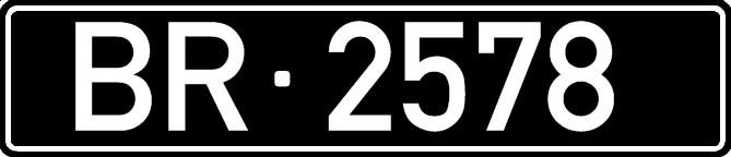 Номерний знак Кабо-Верде